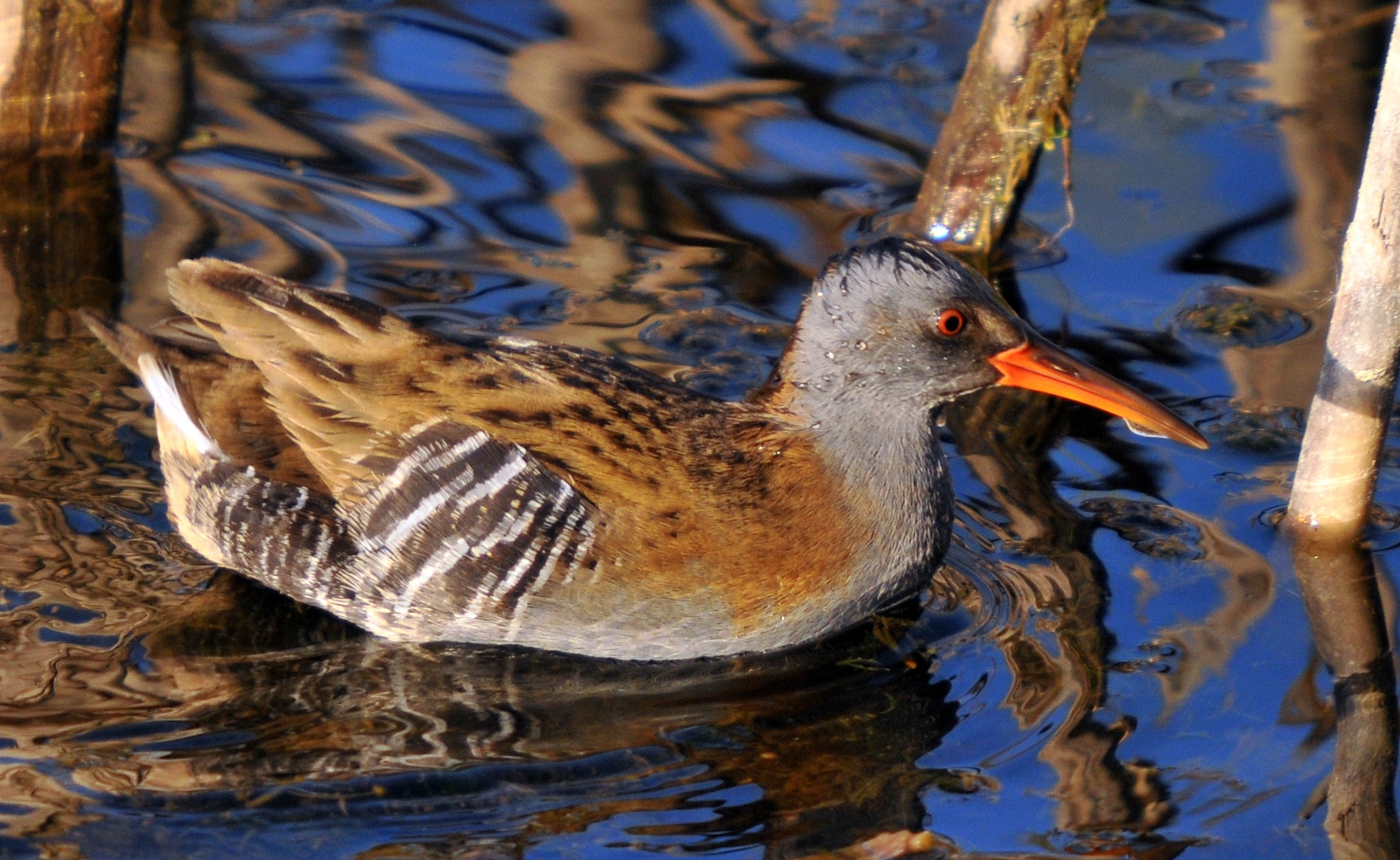 Kurdî: Li Bismilê hatiye kişandin.